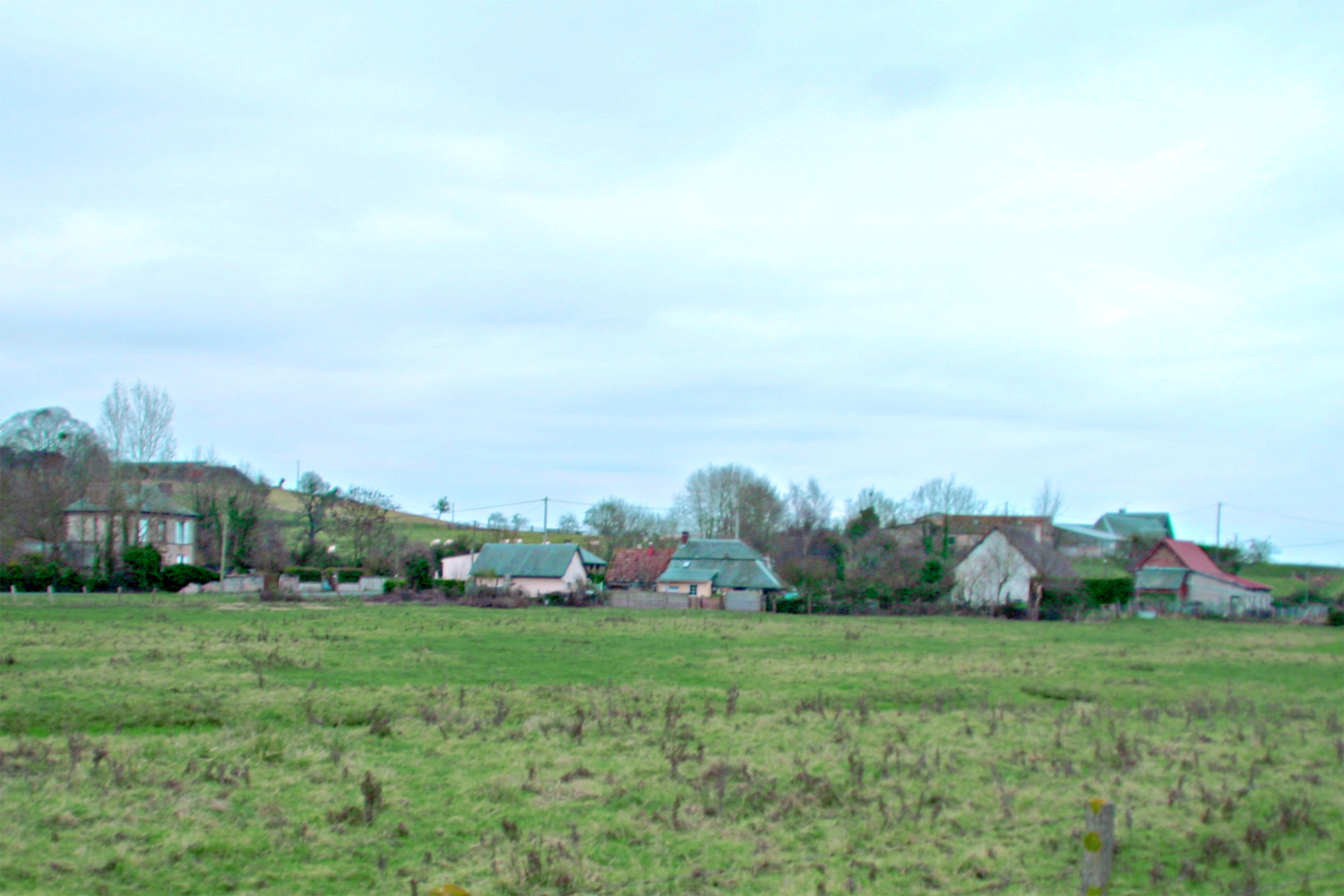 le Bourg, le centre de Brucourt vu du nord ouest